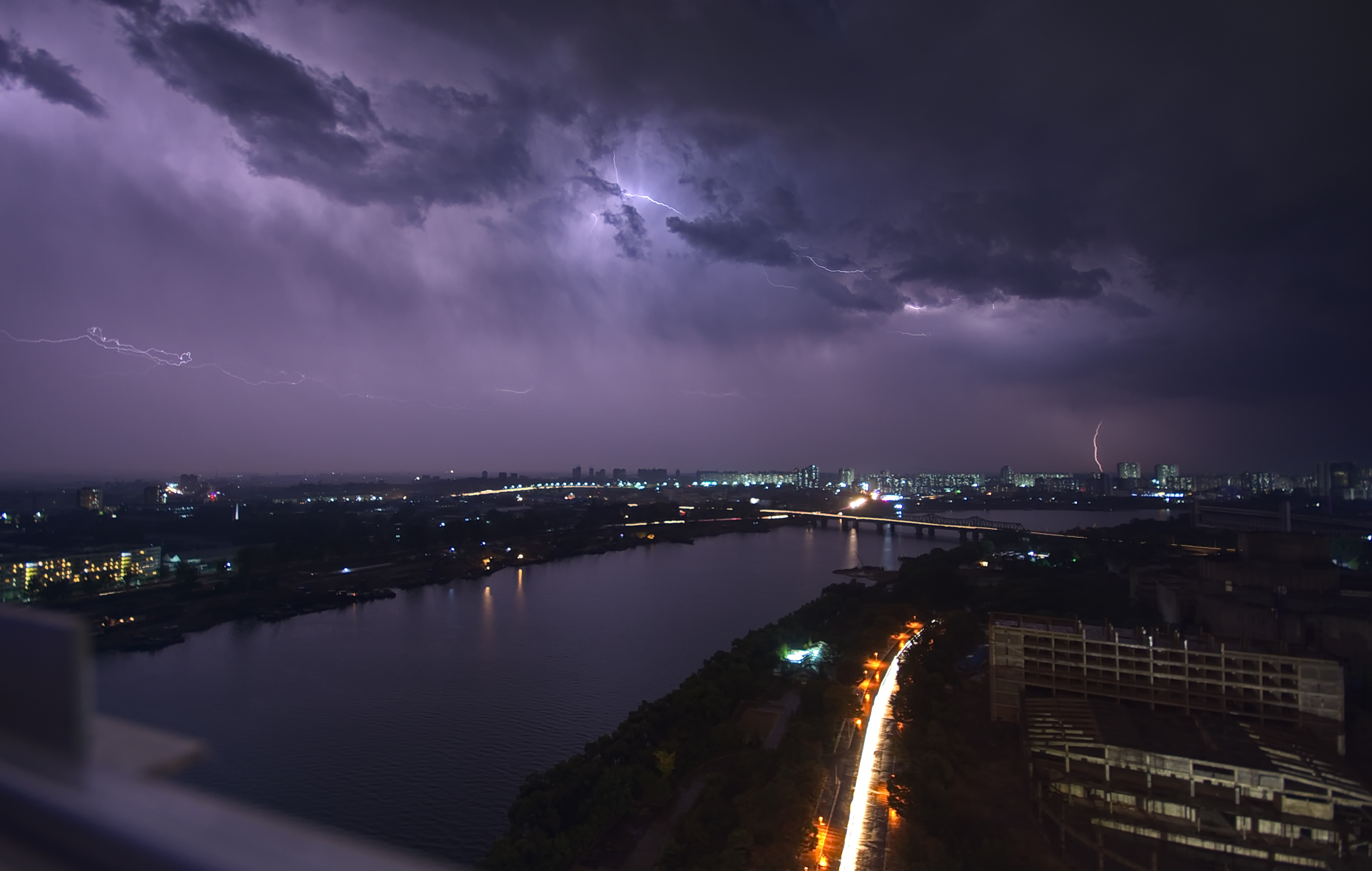 Nordkorea 2015 - Pjöngjang - Blick aus dem Yanggakdo Hotel